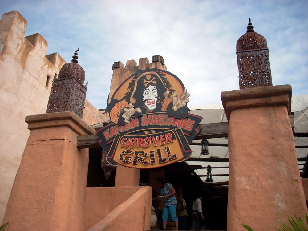 Kaptein Sabeltanns Sjørøvergrill